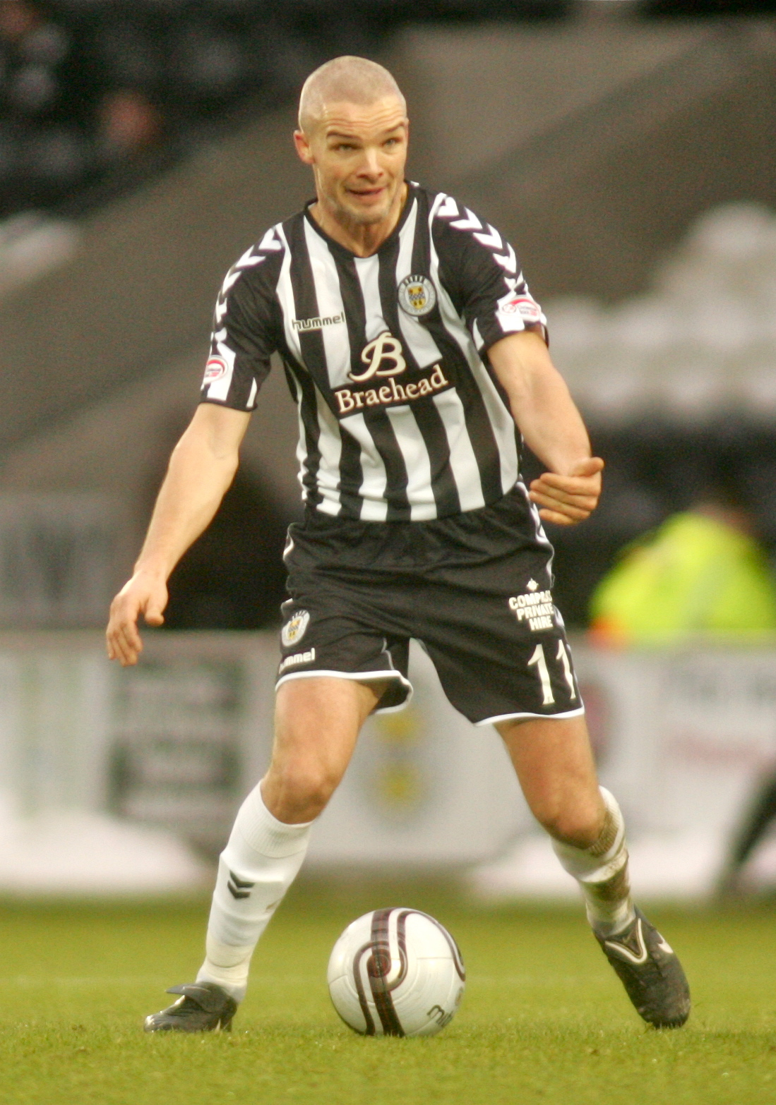 St Mirren vs Peterhead